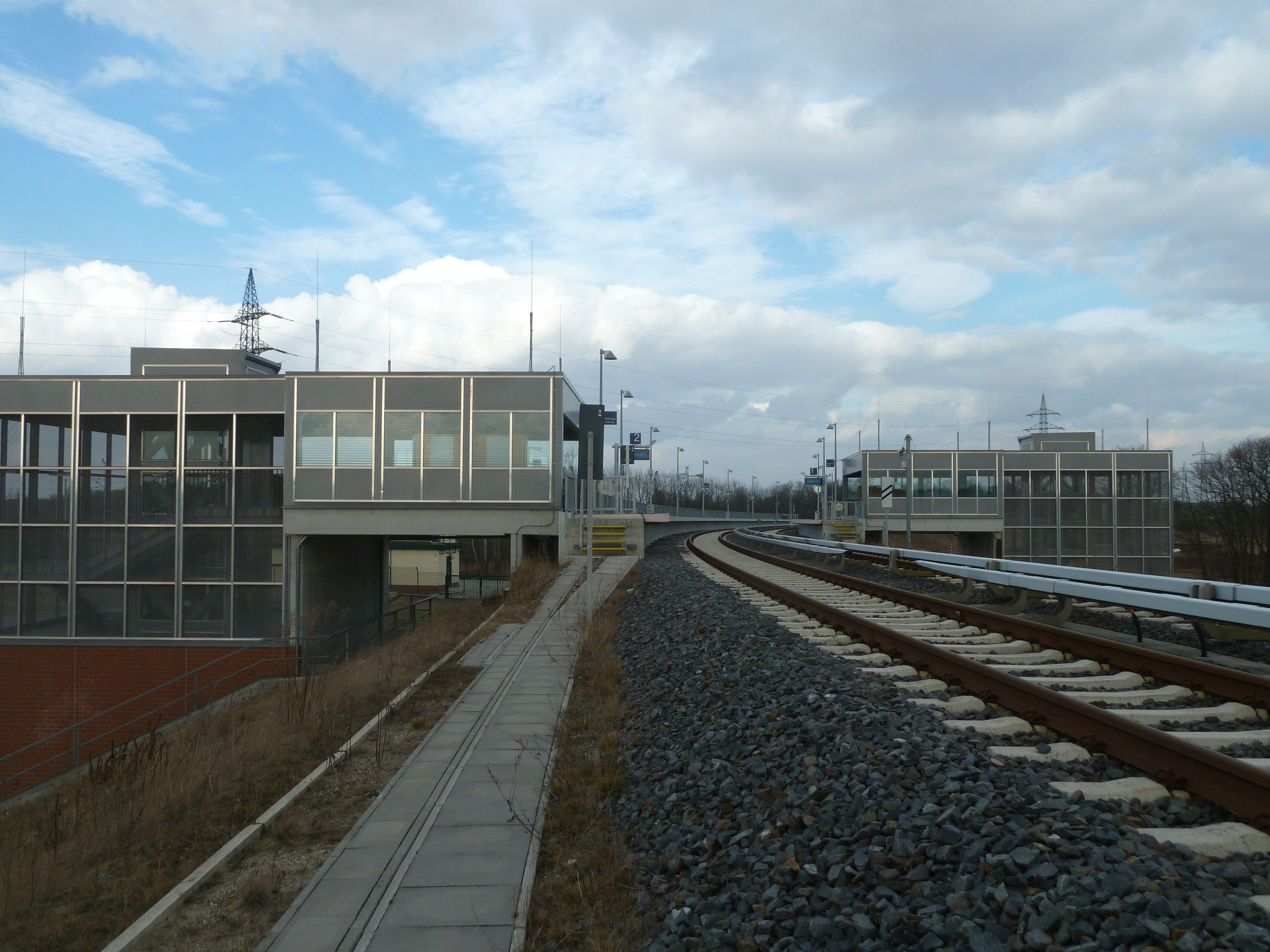 Bahnhof Waßmannsdorf, Bahnsteige und Gleise